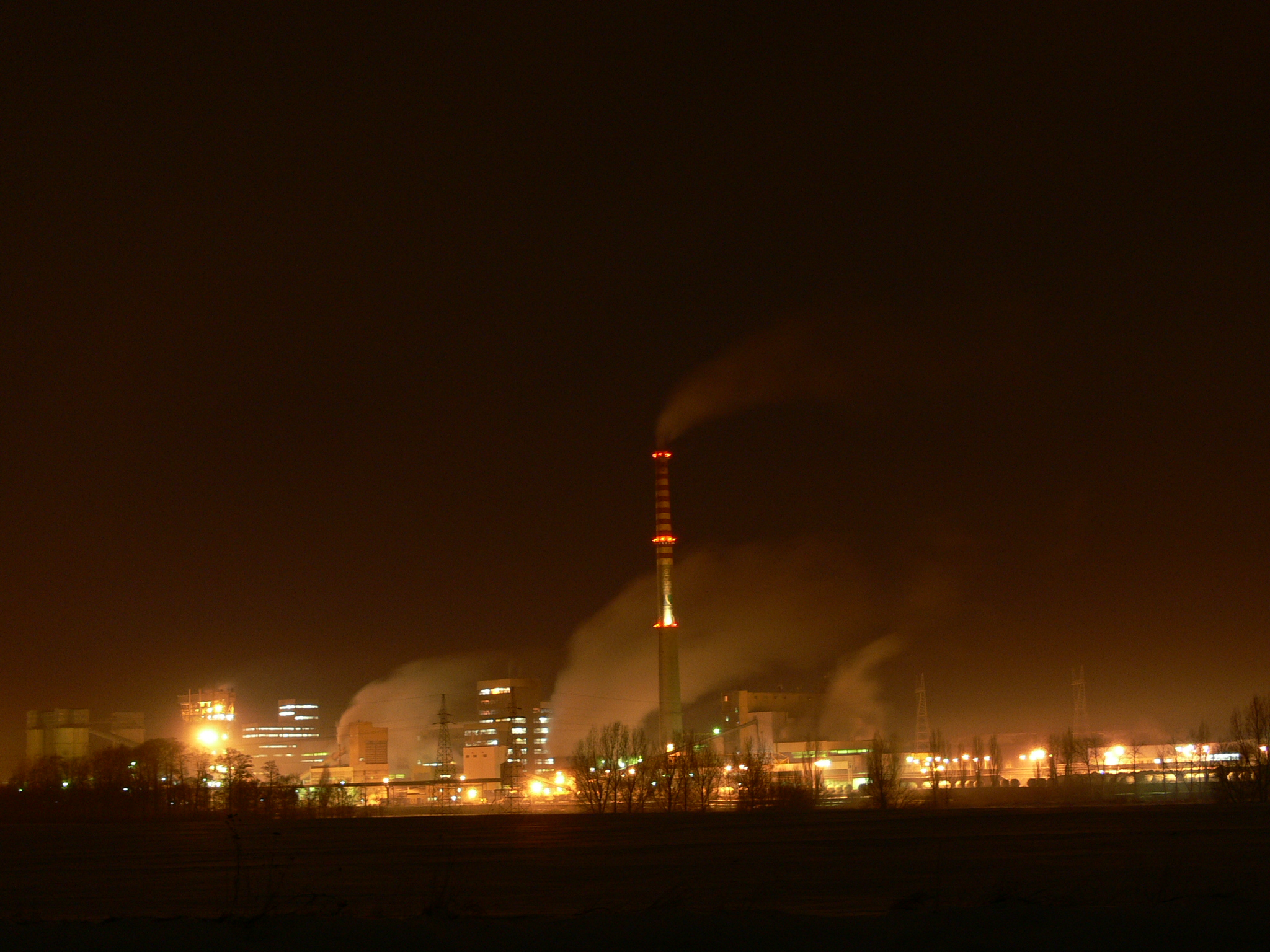 Inowrocław - Inowrocławskie Zakłady Chemiczne "Soda Mątwy" S.A. w nocy.